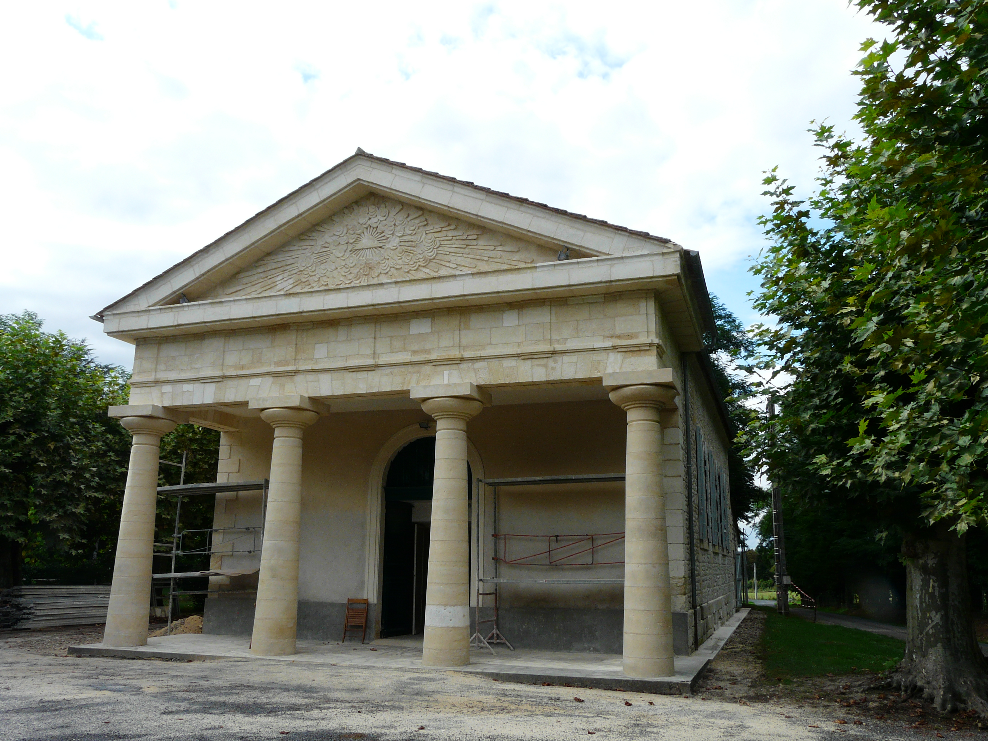 Le temple protestant des Briands, Saint-Avit-Saint-Nazaire, Gironde, France.